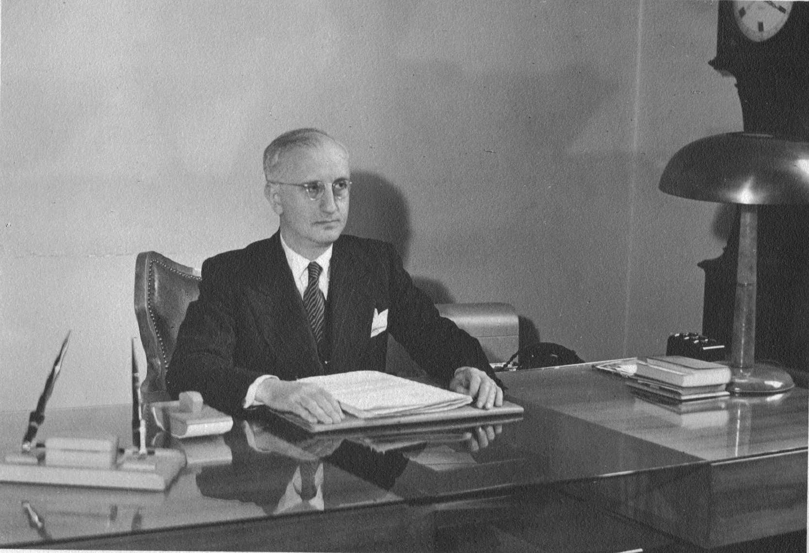 La foto inviatami dalla zia Paola (vi è sul retro la dedica) risale al 28 giugno 1948 e ritrae Aldo Ferrabino nel suo studio di Roma. Ne rilascio libera licenza.